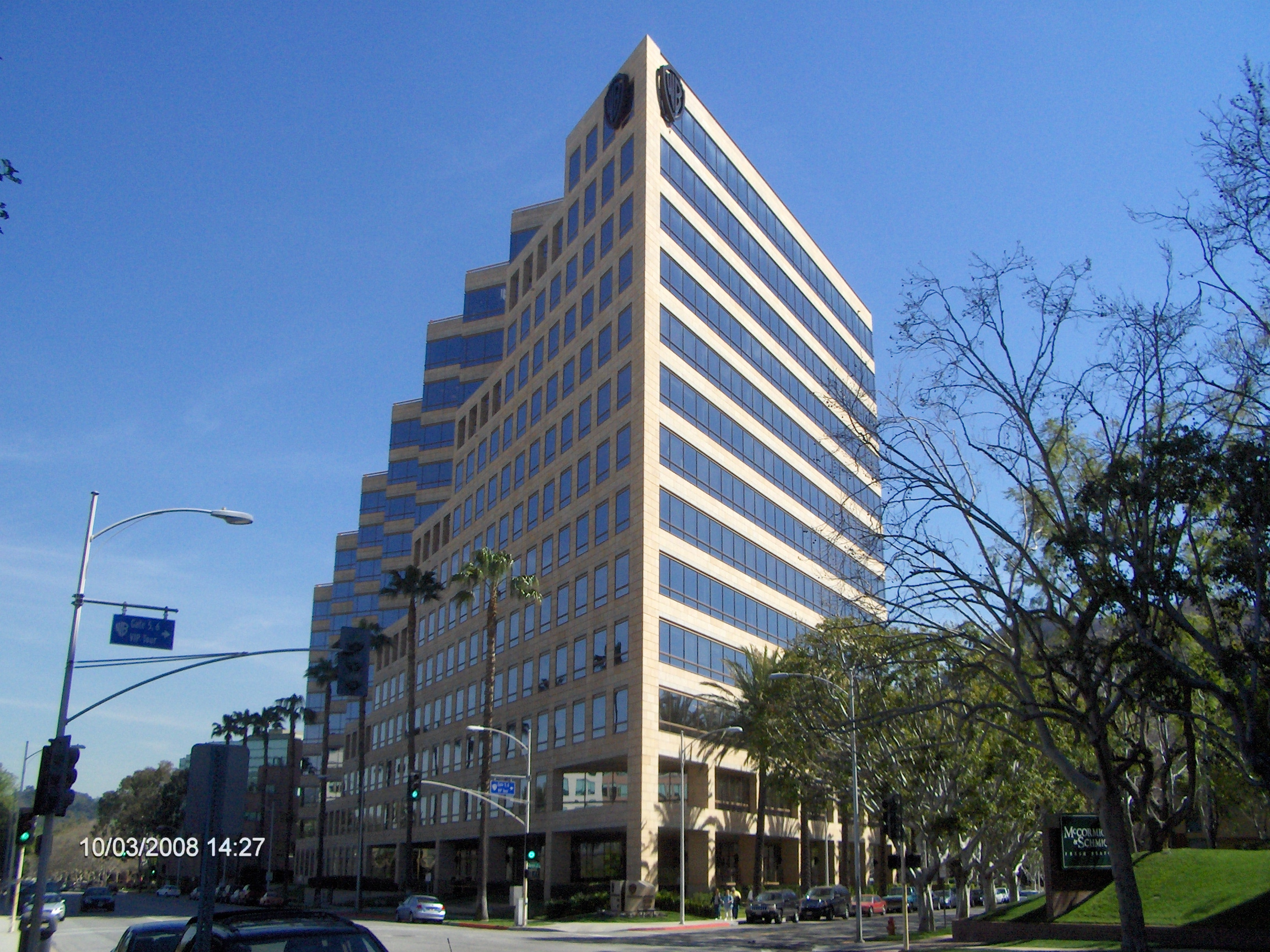 foto van het hoofdkantoor van Warner Bros